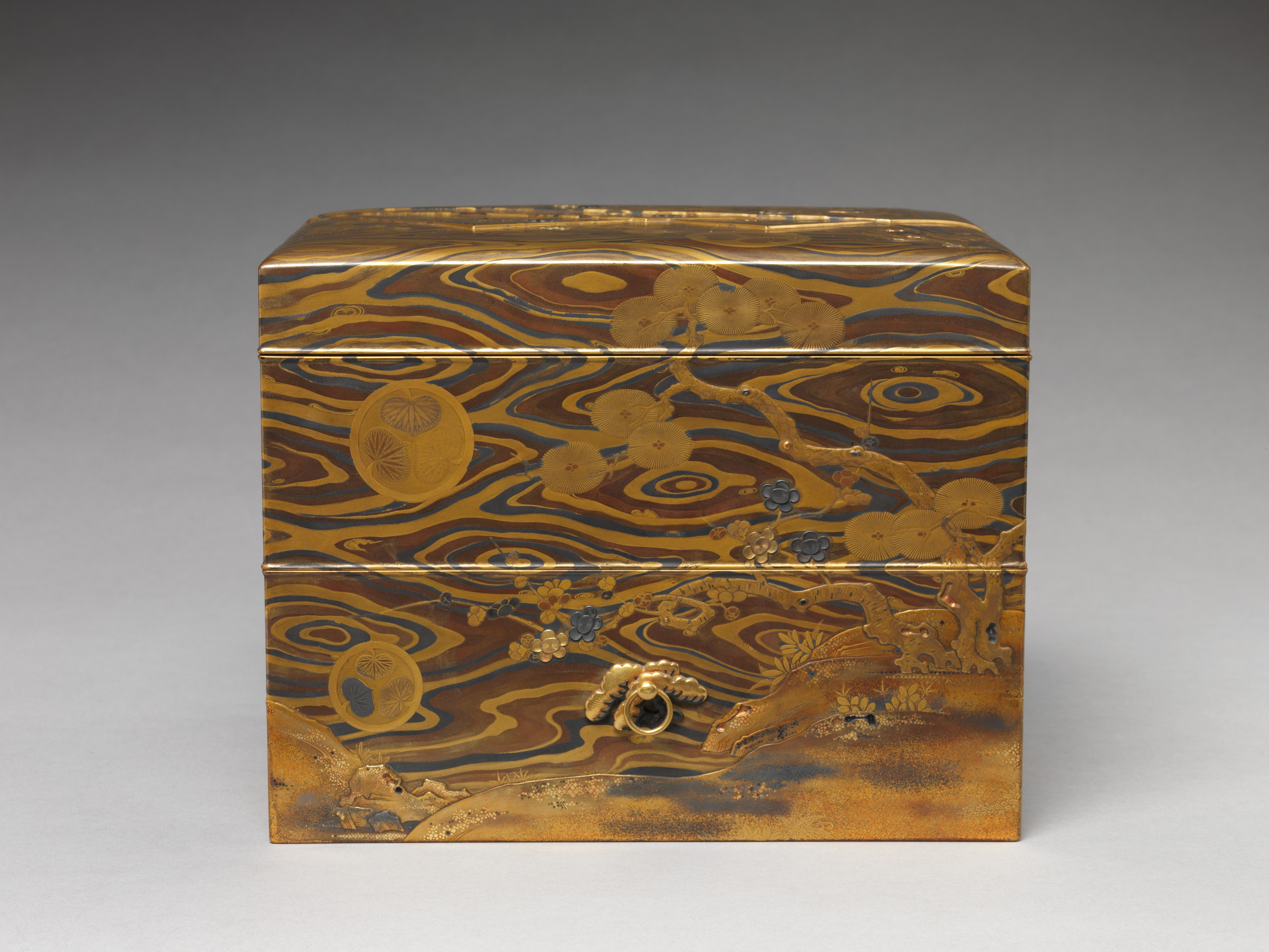 Japan; Box; Lacquer